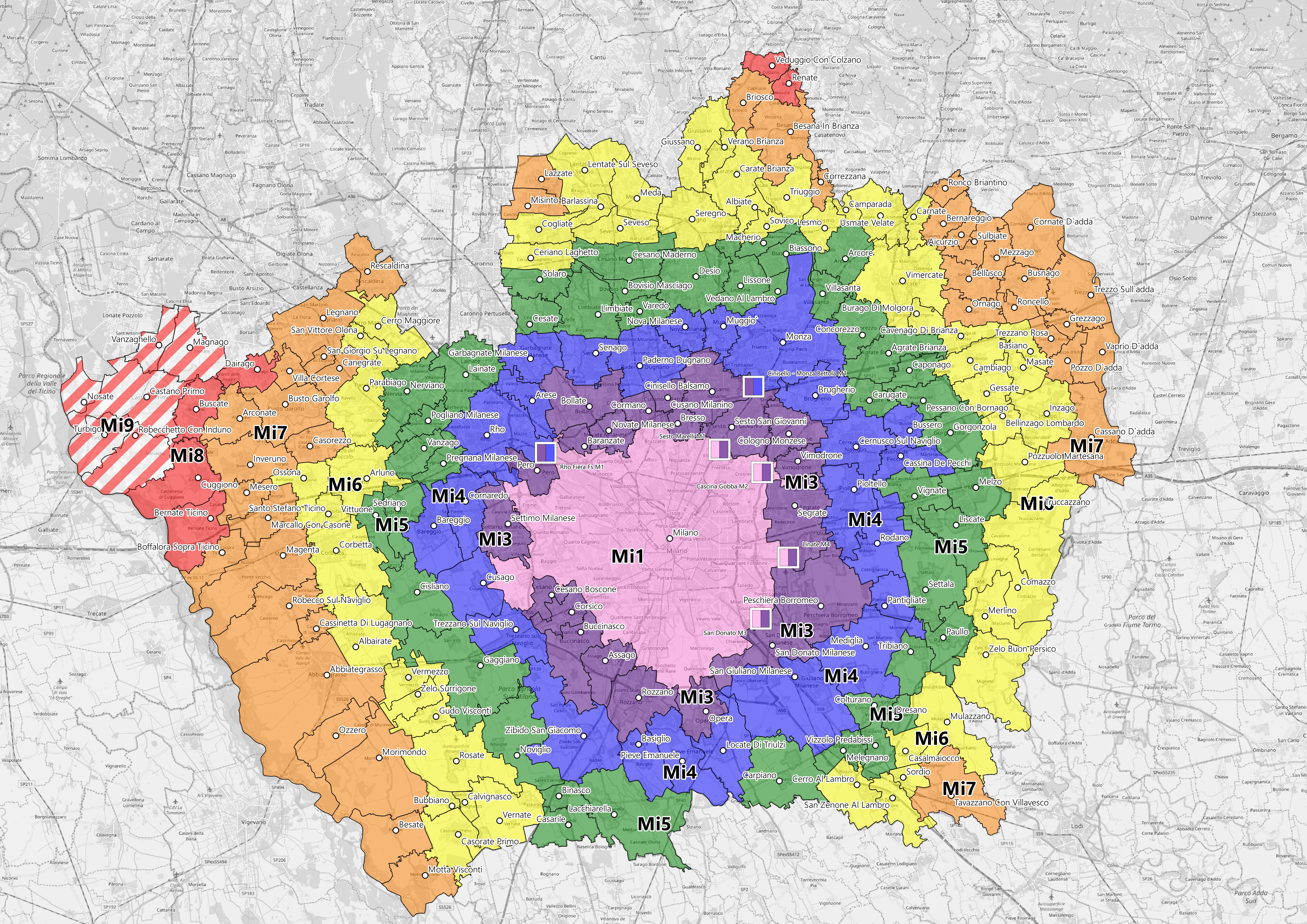 mappa stibm (sistema tariffario integrato)